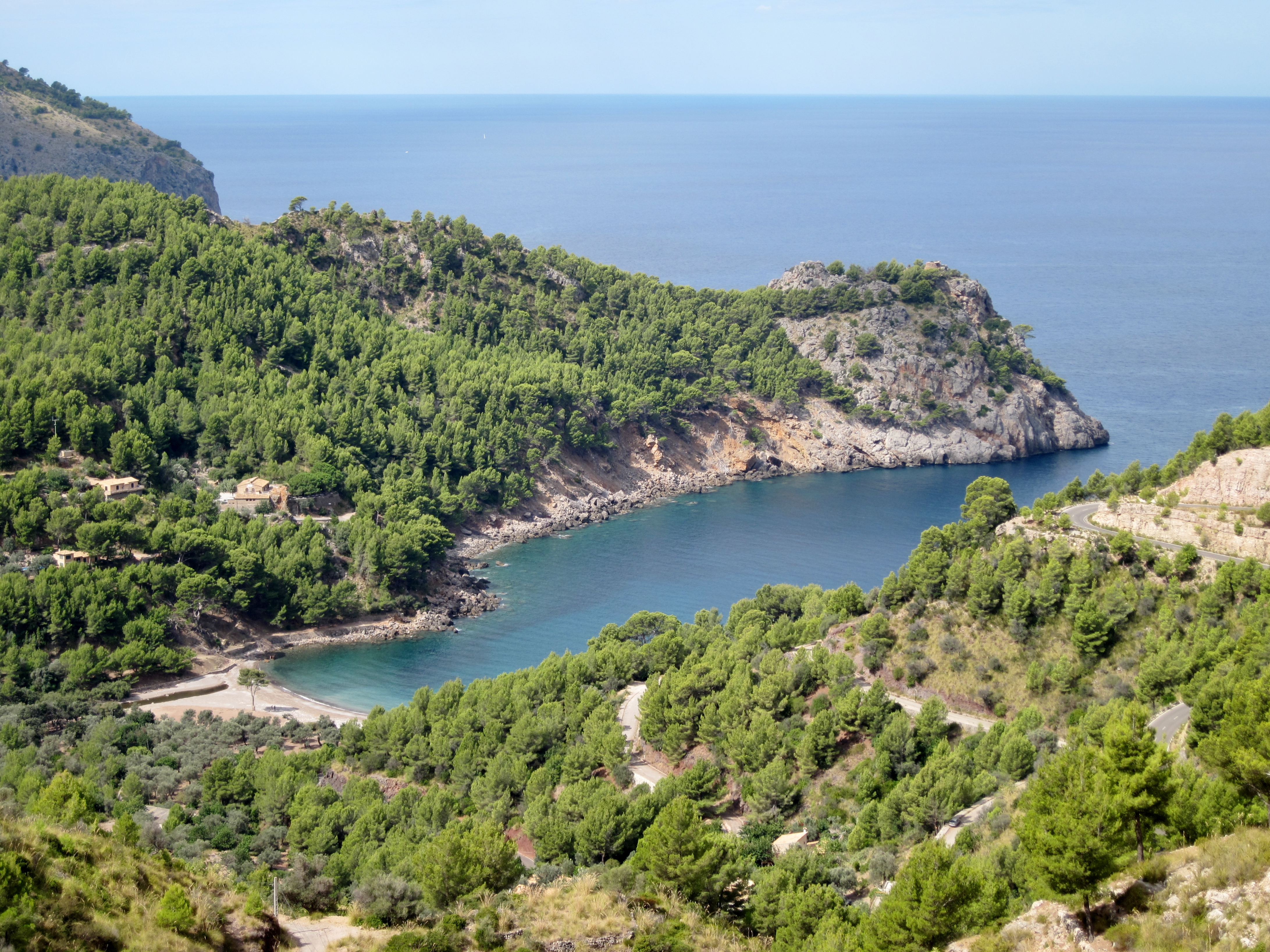 Die Bucht Cala Tuent in der Gemeinde Escorca, Mallorca, Spanien